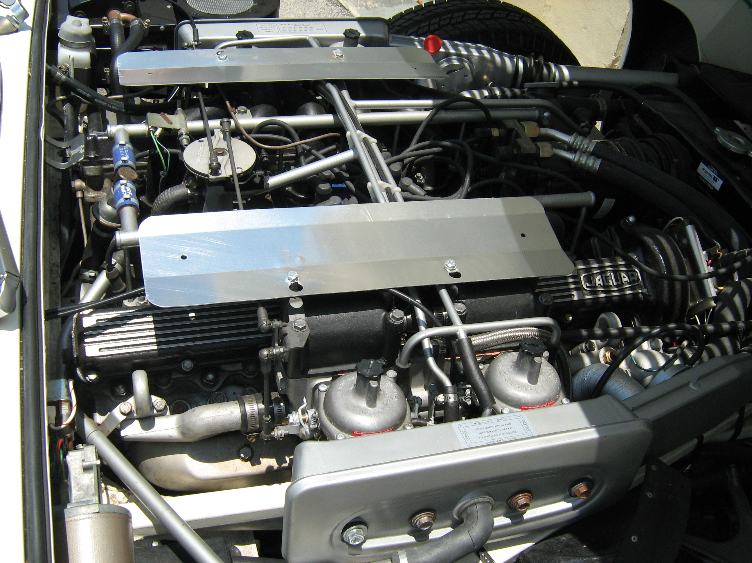 Jaguar V-12 engine